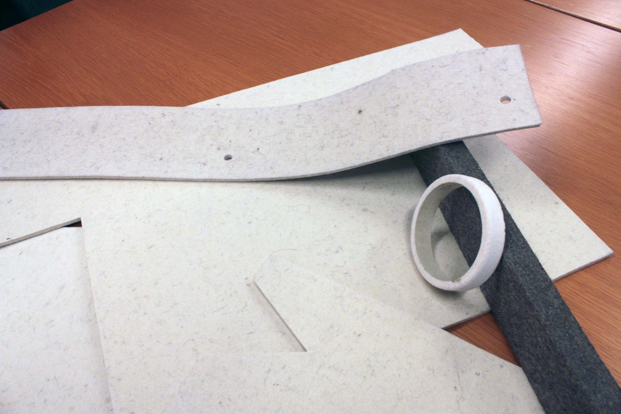 Packningar av stampad filt